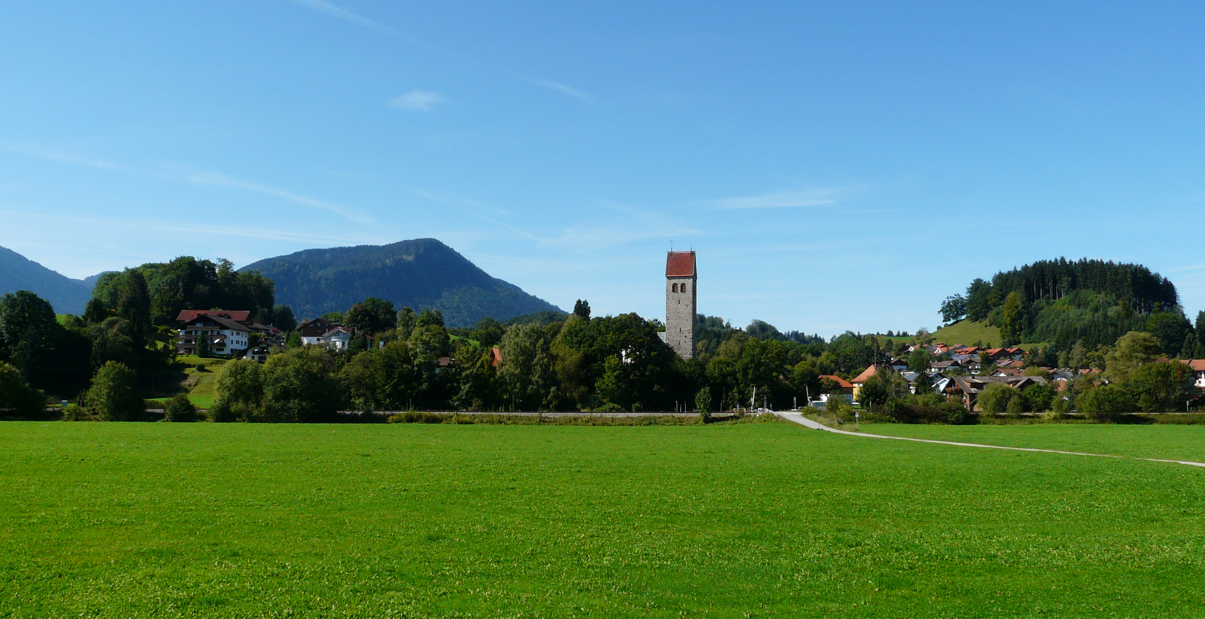 Stein im Allgäu, Immenstadt im Allgäu